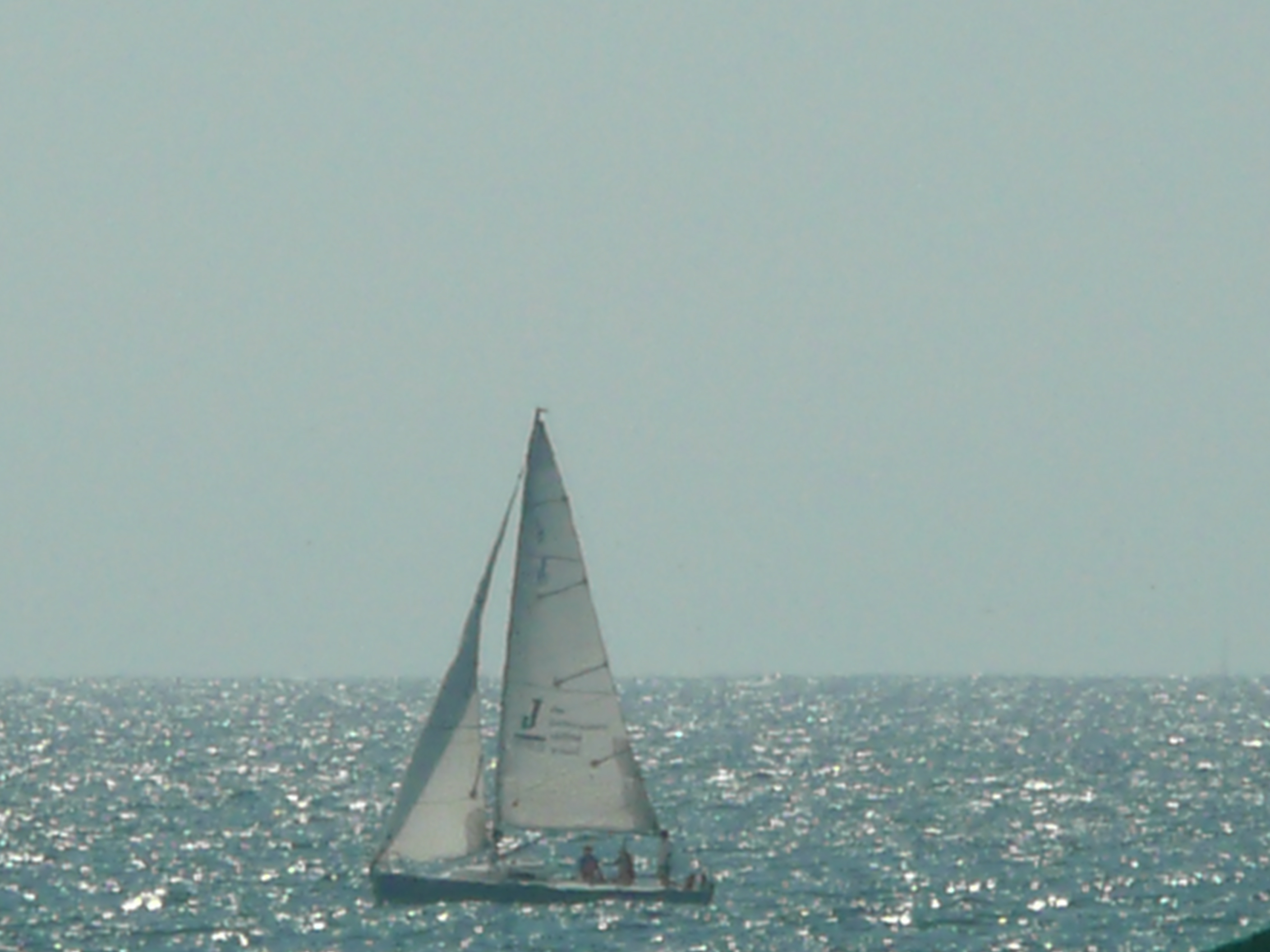 Un velero surca las aguas de Bahia de Banderas, Nay